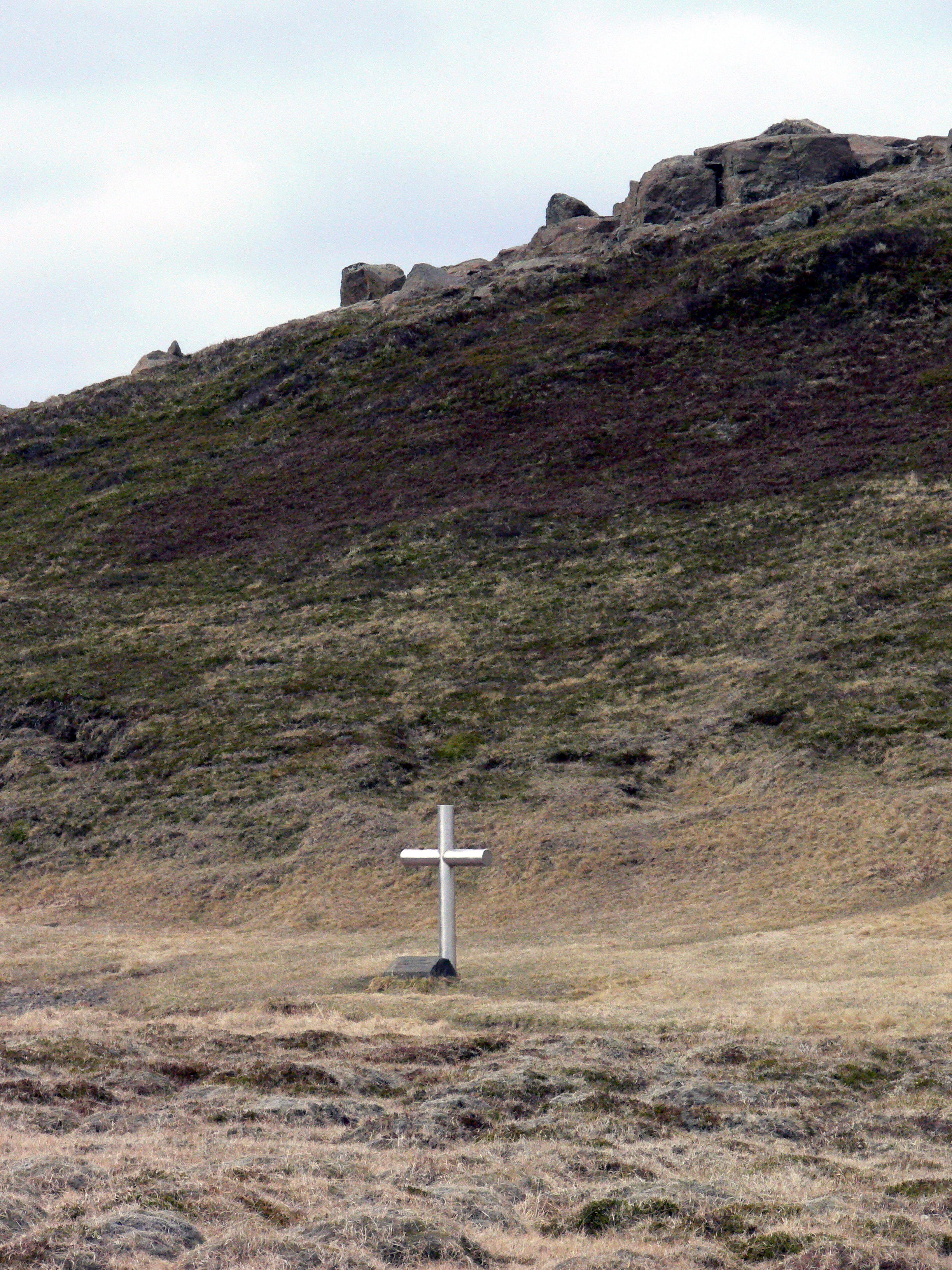 Denkmal am Uxahryggjavegur (Straße von Þingvellir nach Borgarfjörður) für den Bischof Jón Vídalín, der 1720 auf einer Reise hier starb.